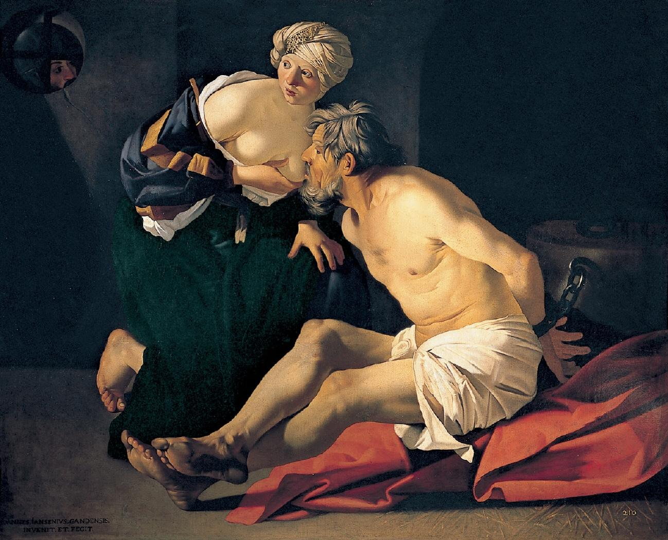 La obra representa a Pero amamantando a su padre, Cimón, un anciano encarcelado y sentenciado a muerte por inanición.